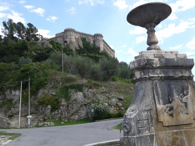 Castello Piccolomini visto dalla fontana barocca di San Martino a Balsorano Vecchio